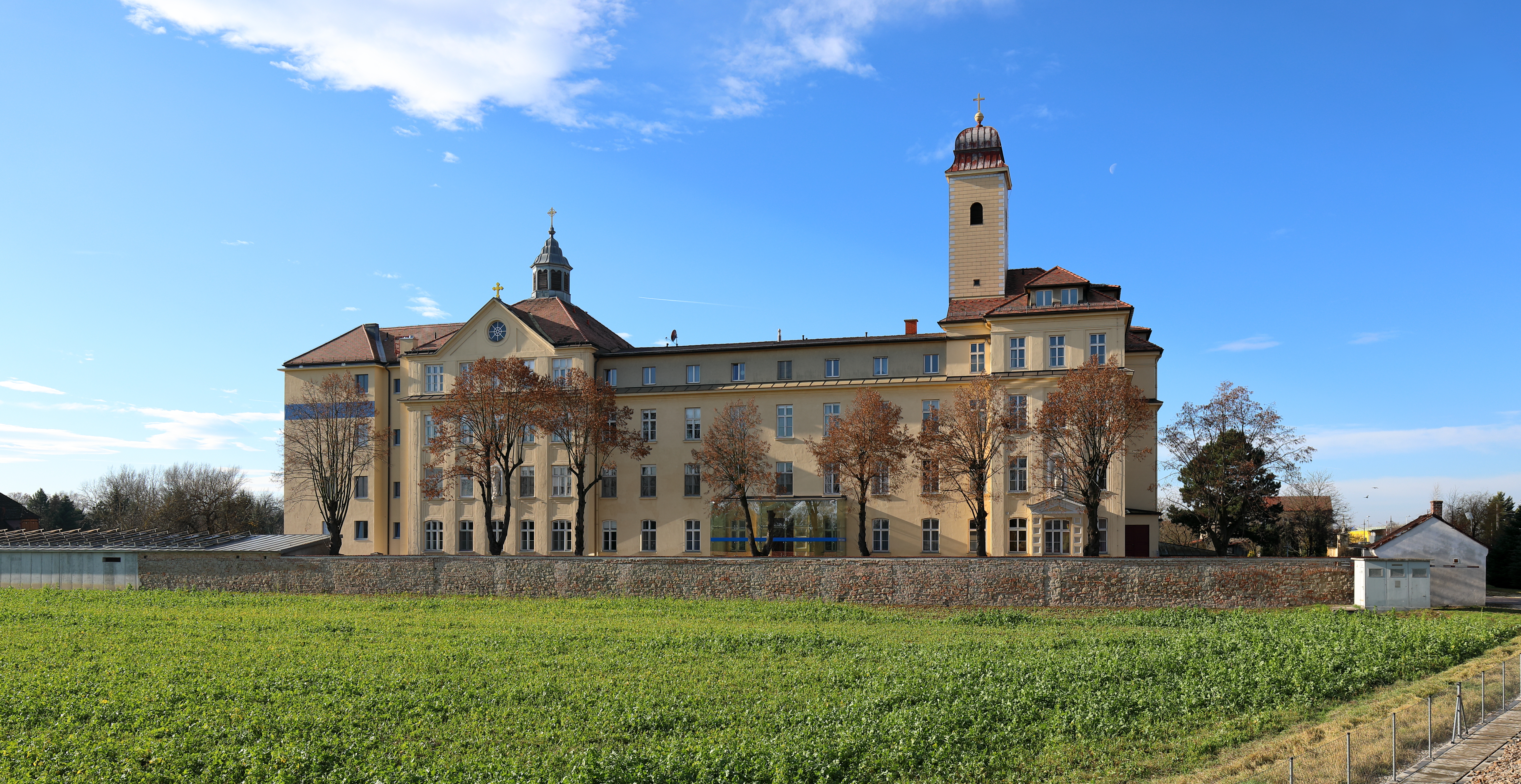 Ostnordostansicht des Klosters St. Koloman in der niederösterreichischen Stadt Stockerau.Das Kloster wurde von 1912 bis 1913 anstelle eines Vorgängerklosters von den Steyler Missionsschwestern nach den Plänen des Architekten Bruno Buchwieser errichtet. Von 1936 bis 1937 wurde das Kloster wieder mit Buchwieser um einen Nordtrakt erweitert sowie eine neue Klosterkirche errichtet und 1978 erfolgte südseitig ein viergeschossiger Zubau.